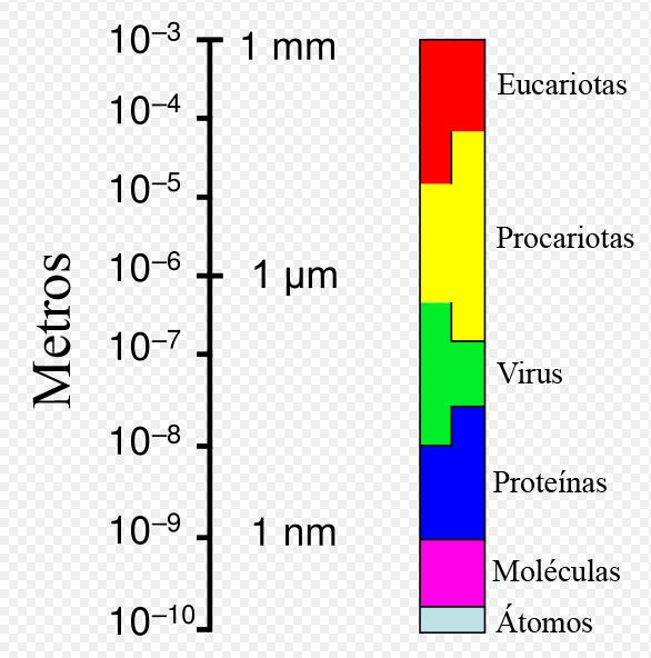 Rango de tamaños desde los átomos a las células eucariotas.